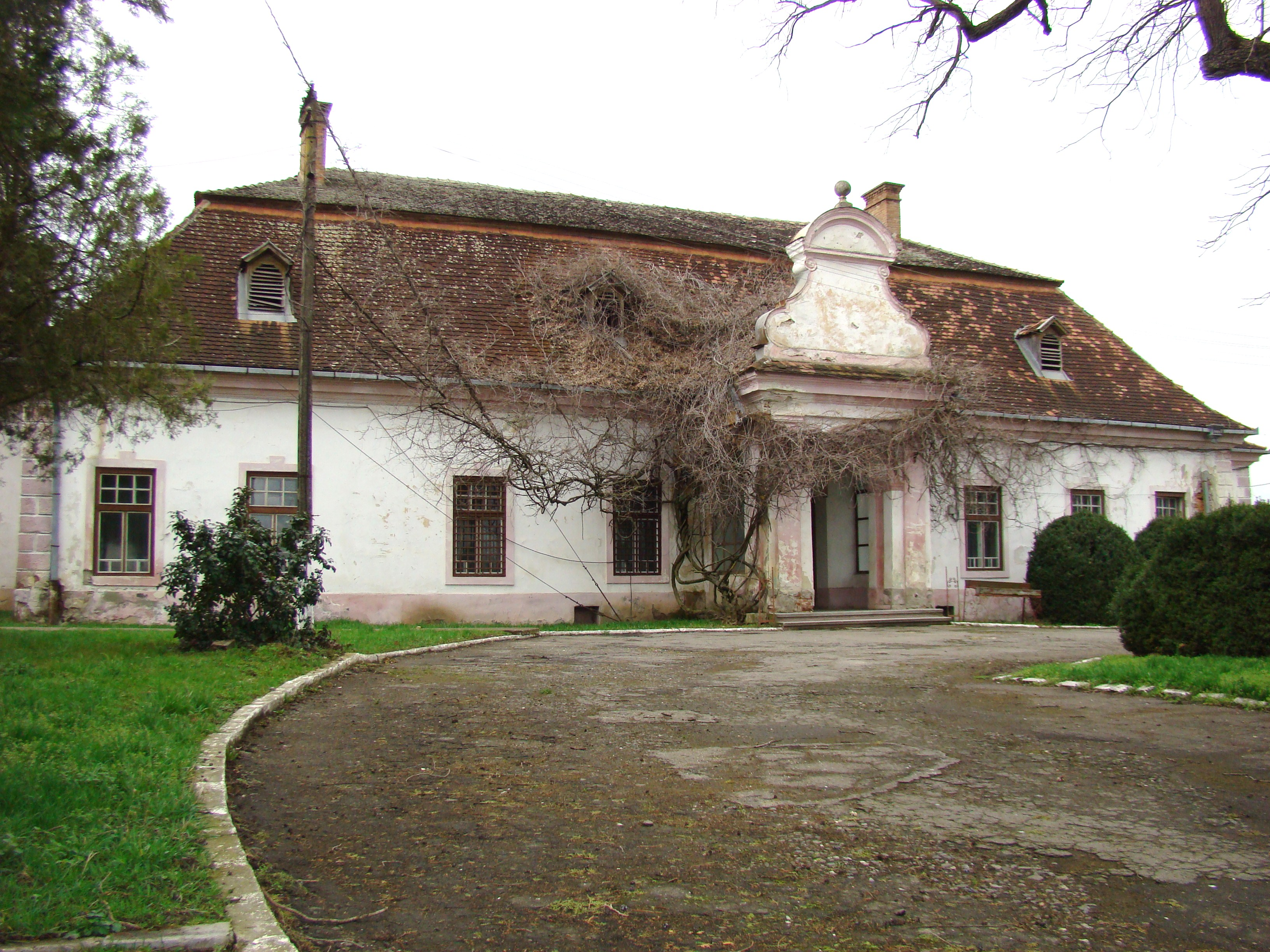 Castelul Rhédei-Rothenthal, Corp A, sat Seuca; comuna Gănești 01